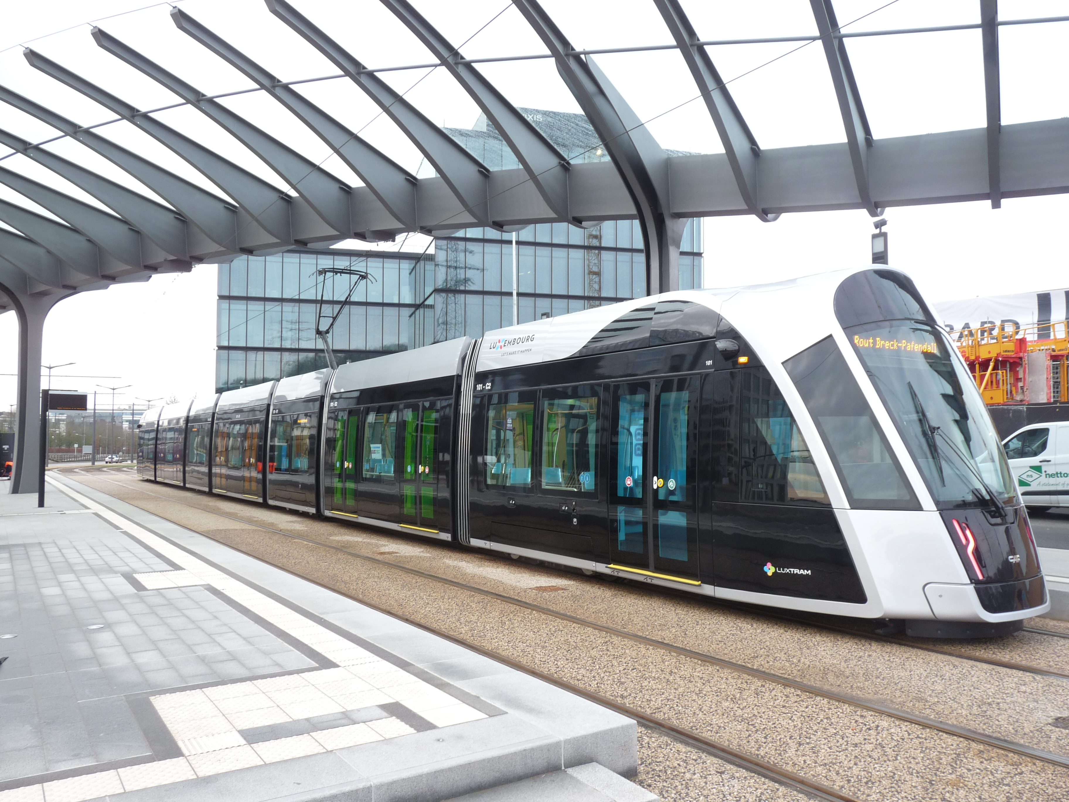 De tram in Luxemburg stad